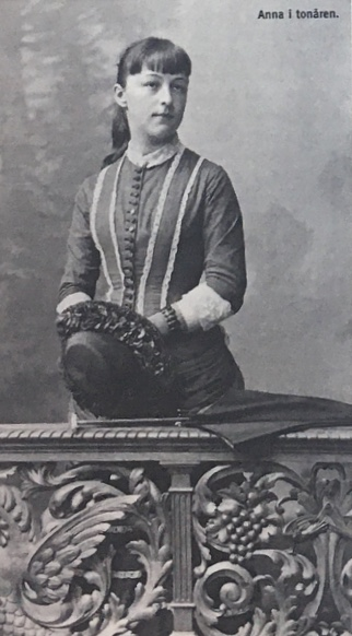 Anna Hammarström, senare Hofman-Uddgren, i tonåren. IMG 9219